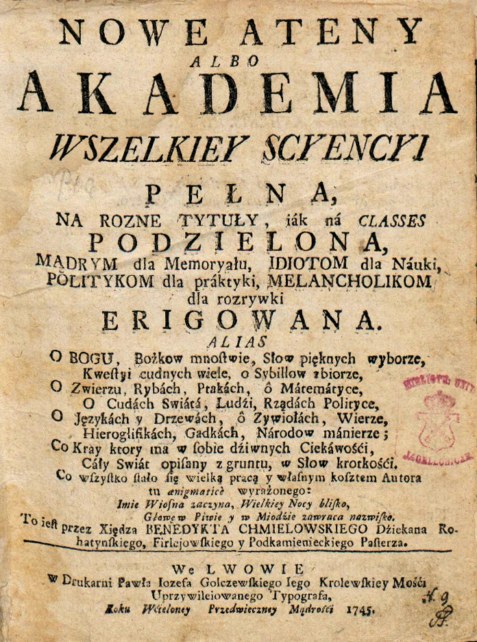 Chmielowski Benedykt Nowe Ateny albo Akademia wszelkiey scyencyi pełna